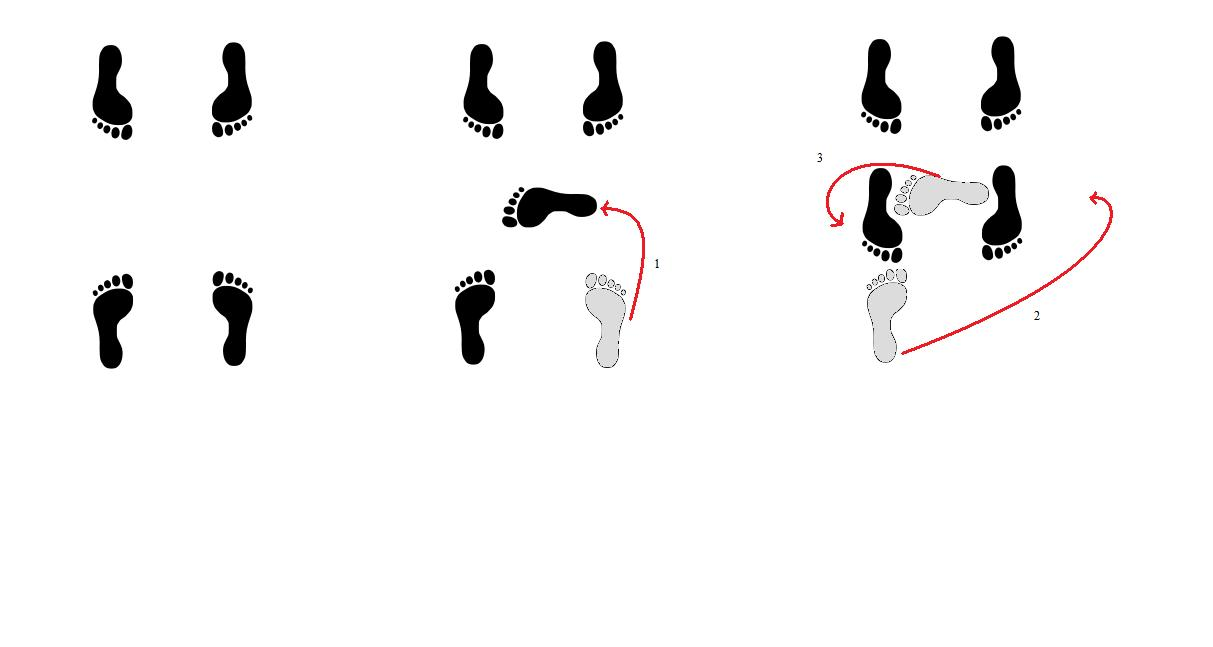 pas de judo concernant une technique